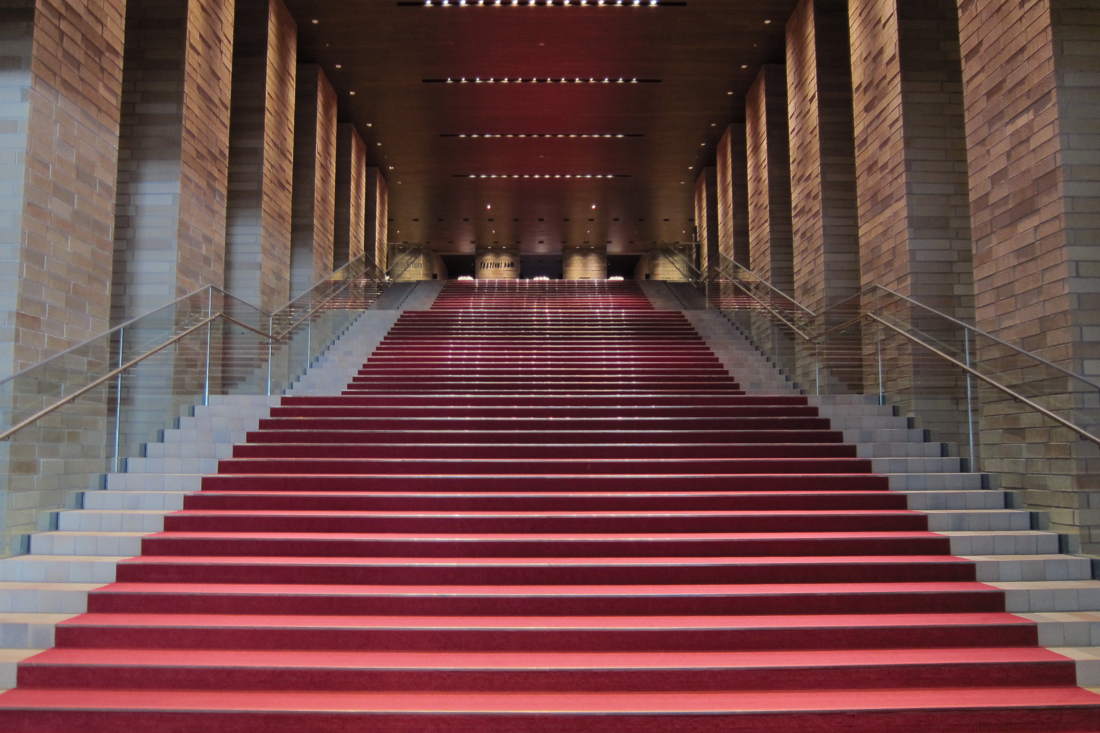 Festival Hall (フェスティバルホール), Osaka, Osaka prefecture, Japan